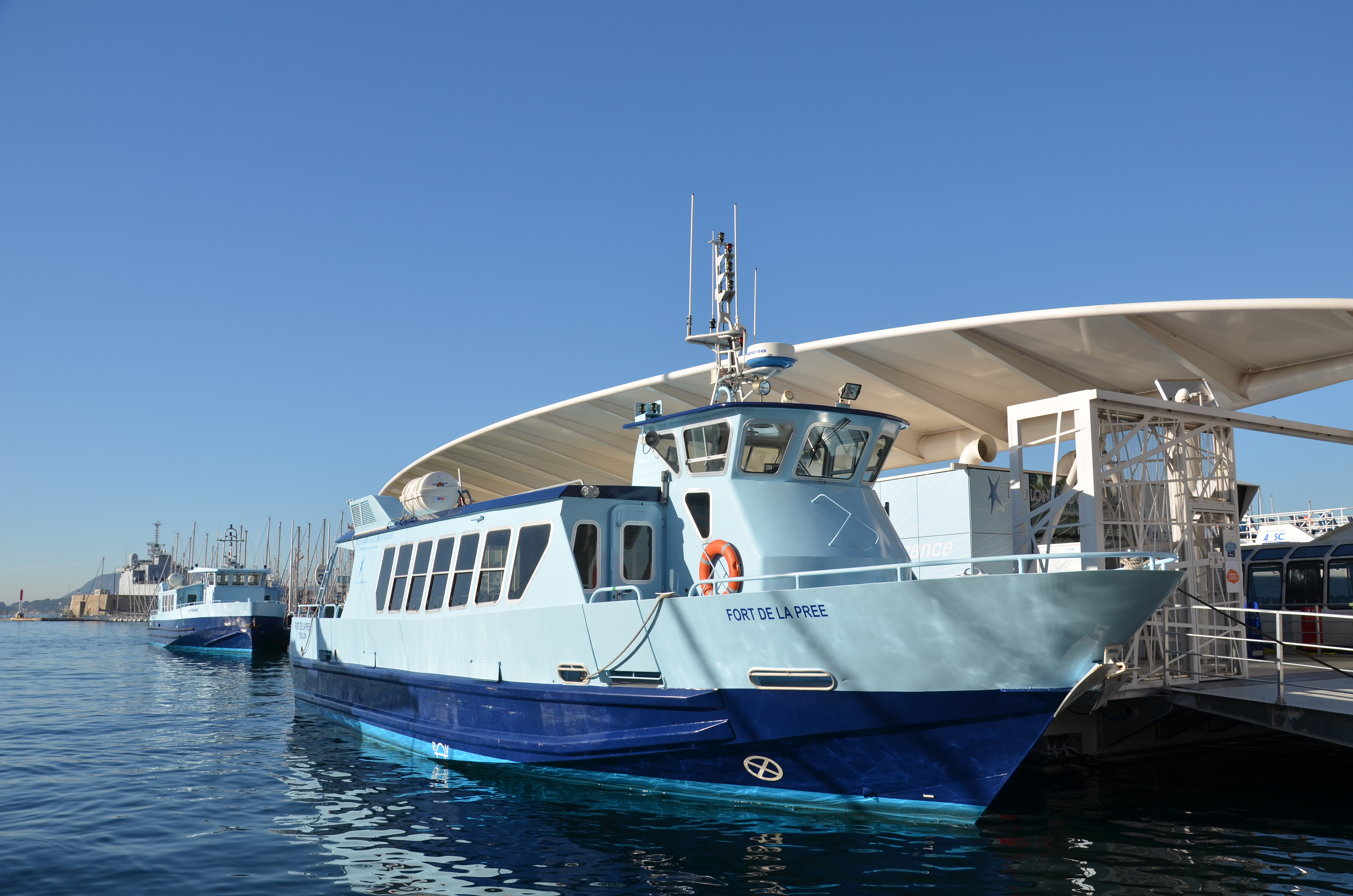 Bateau-Bus "Fort de la Prée" du réseau Mistral à Toulon Station Maritime.